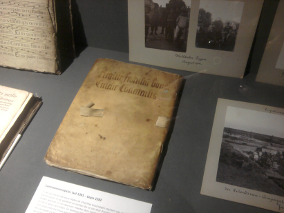 leenmannenregister